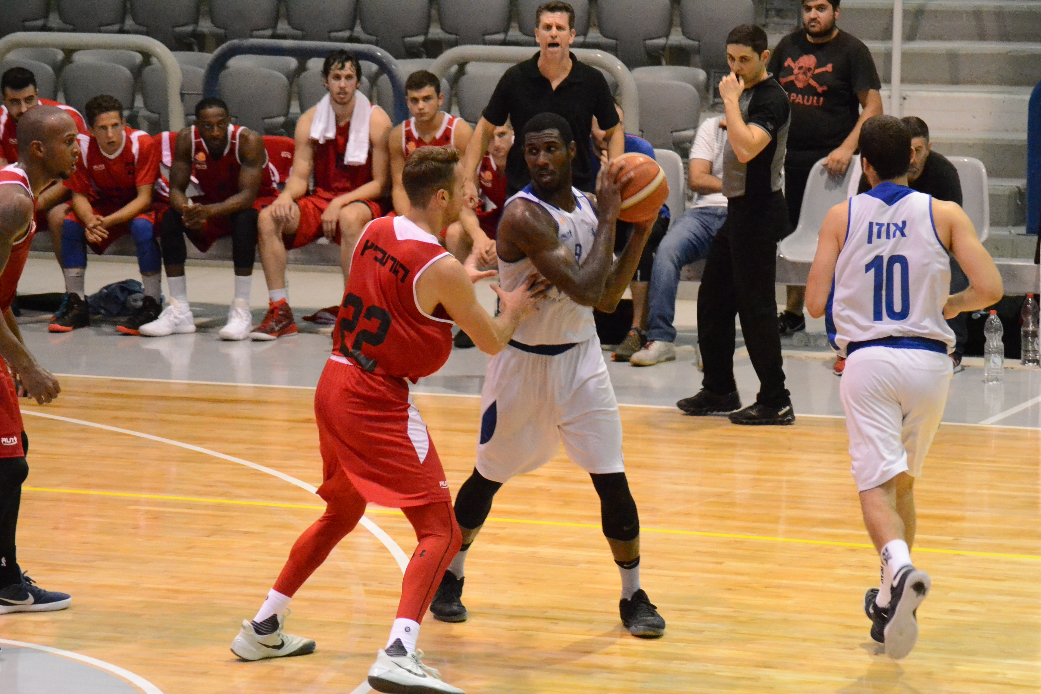 שחקני הפועל מגדל העמק/יזרעאל במהלך משחק מול הפועל חיפה באולם יערת העמק במסגרת ההכנות לליגה הלאומית 2017